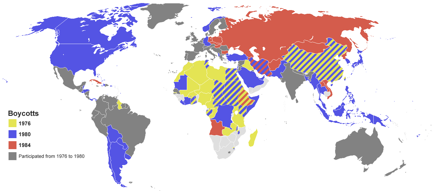 Boycott JO 80